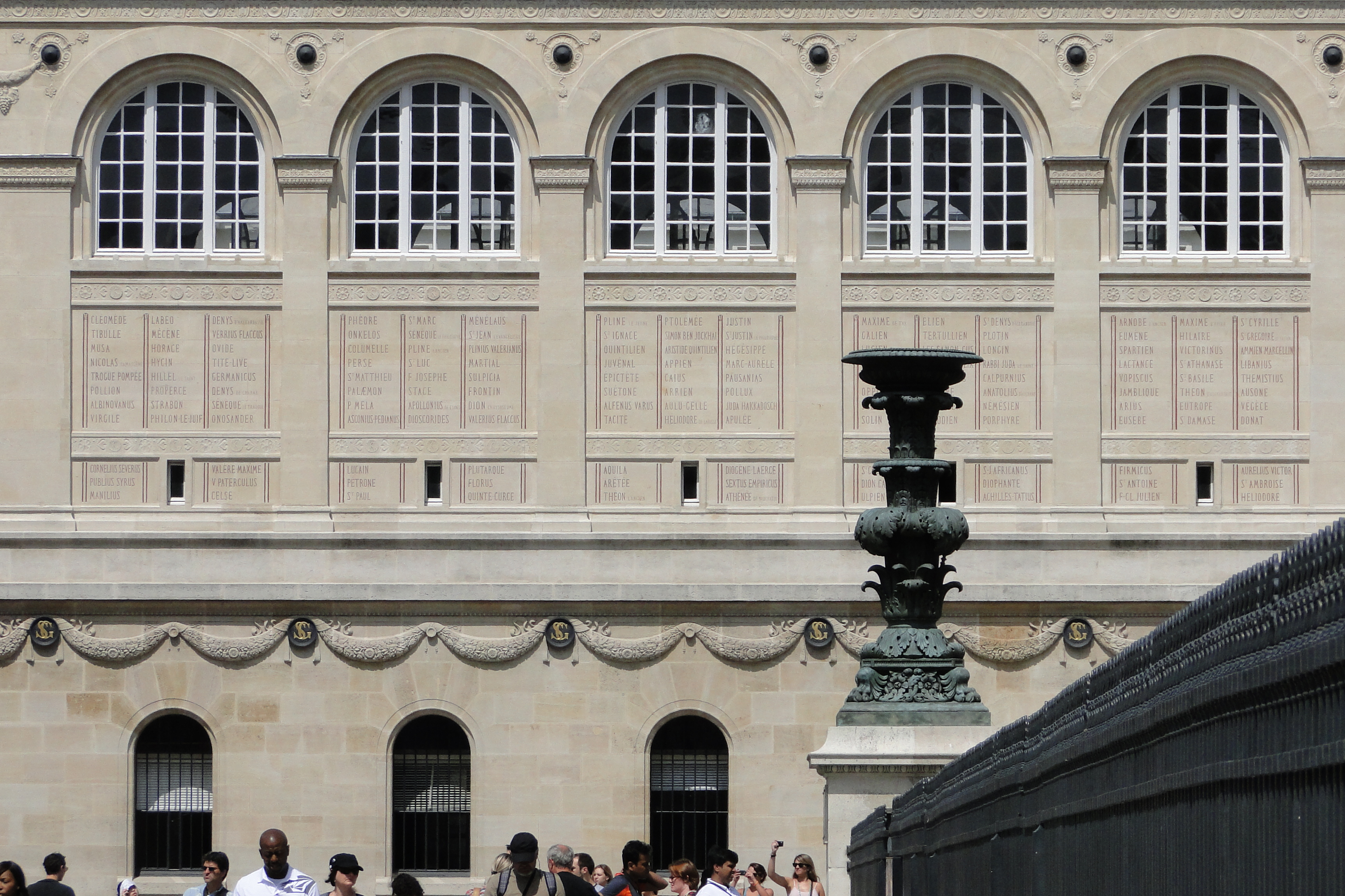 Façade Sud, place du Panthéon, détail